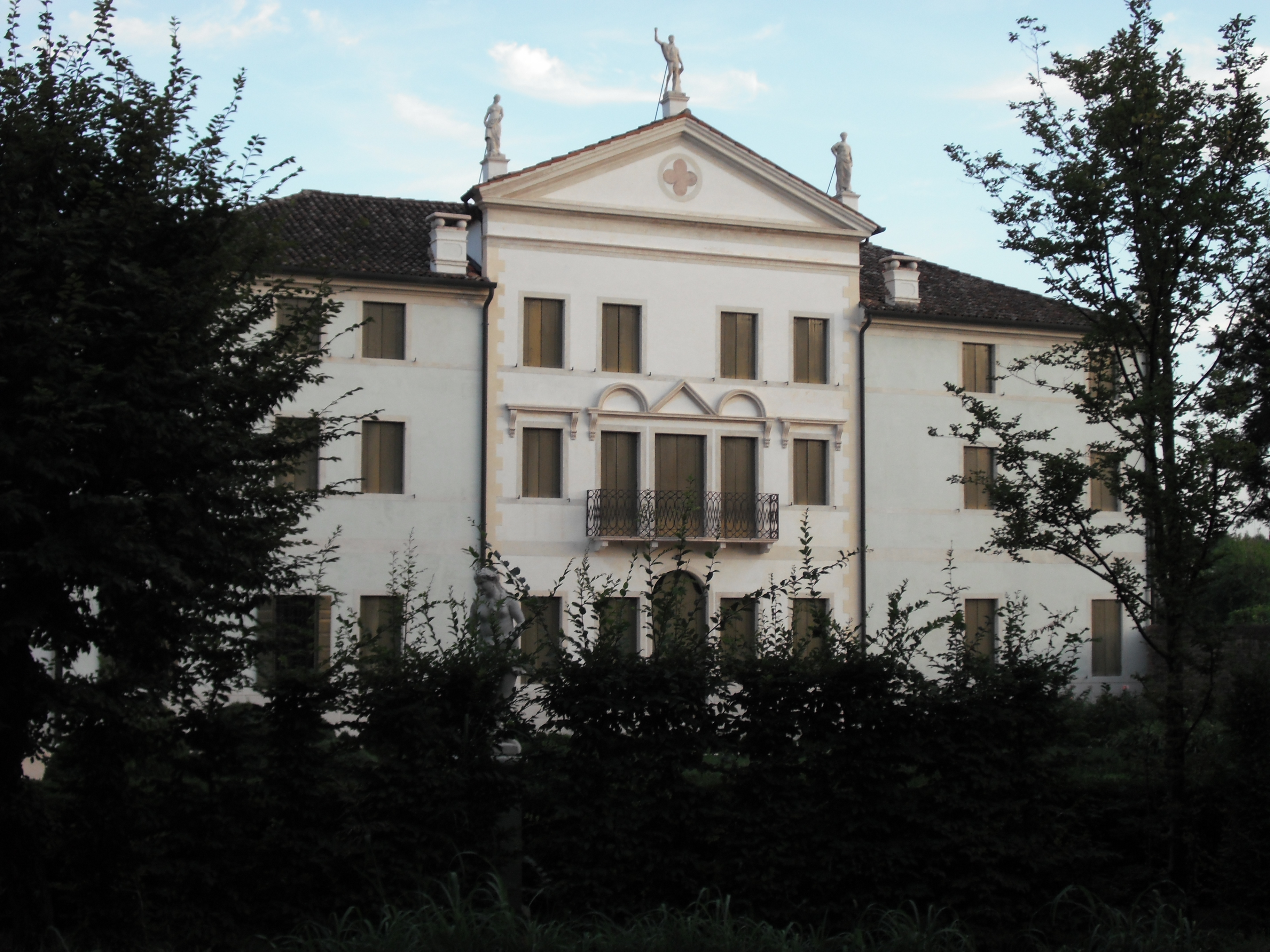 Villa Zanga a Mogliano Veneto.